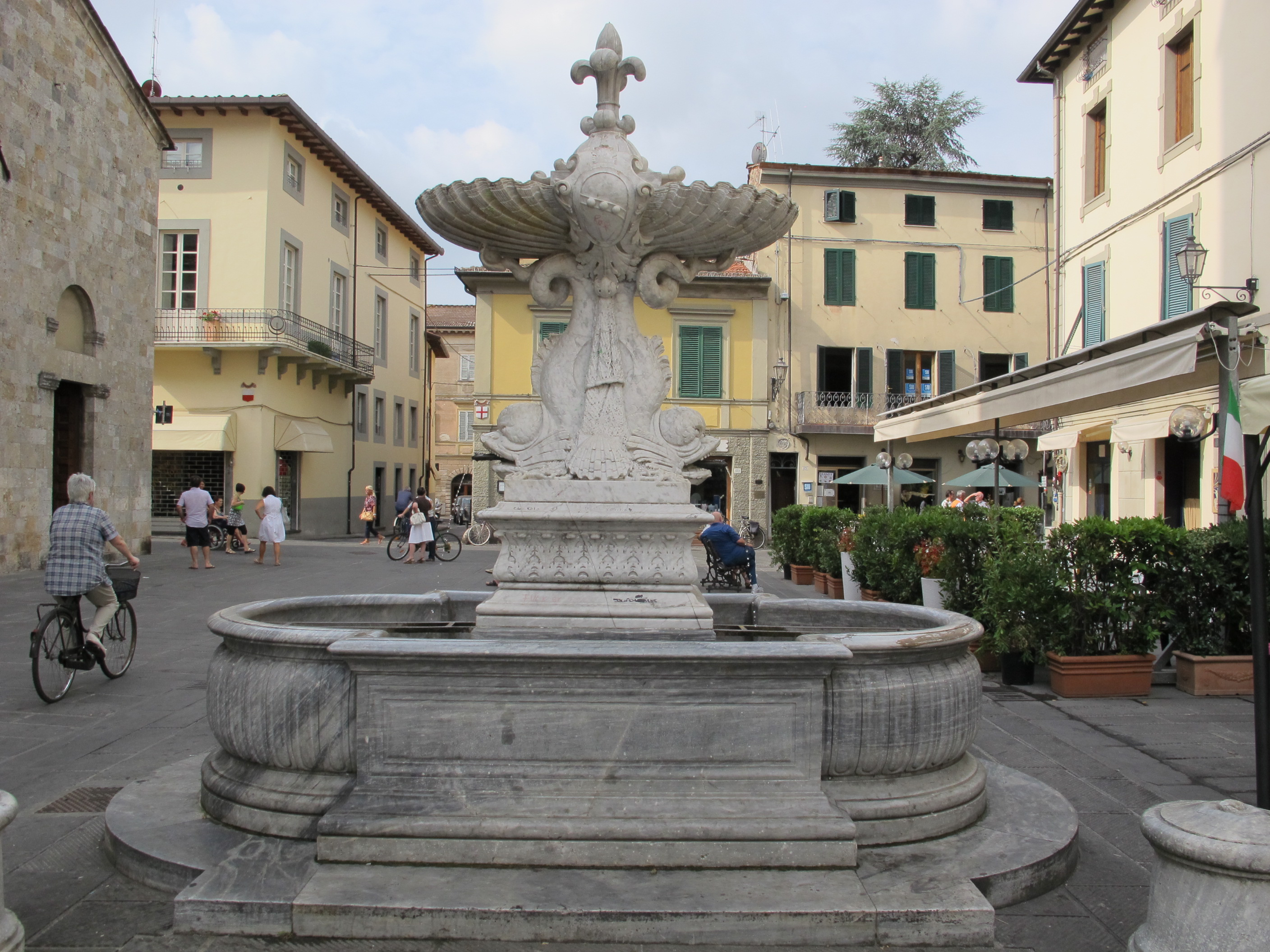 Camaiore, fontana nella piazza principale